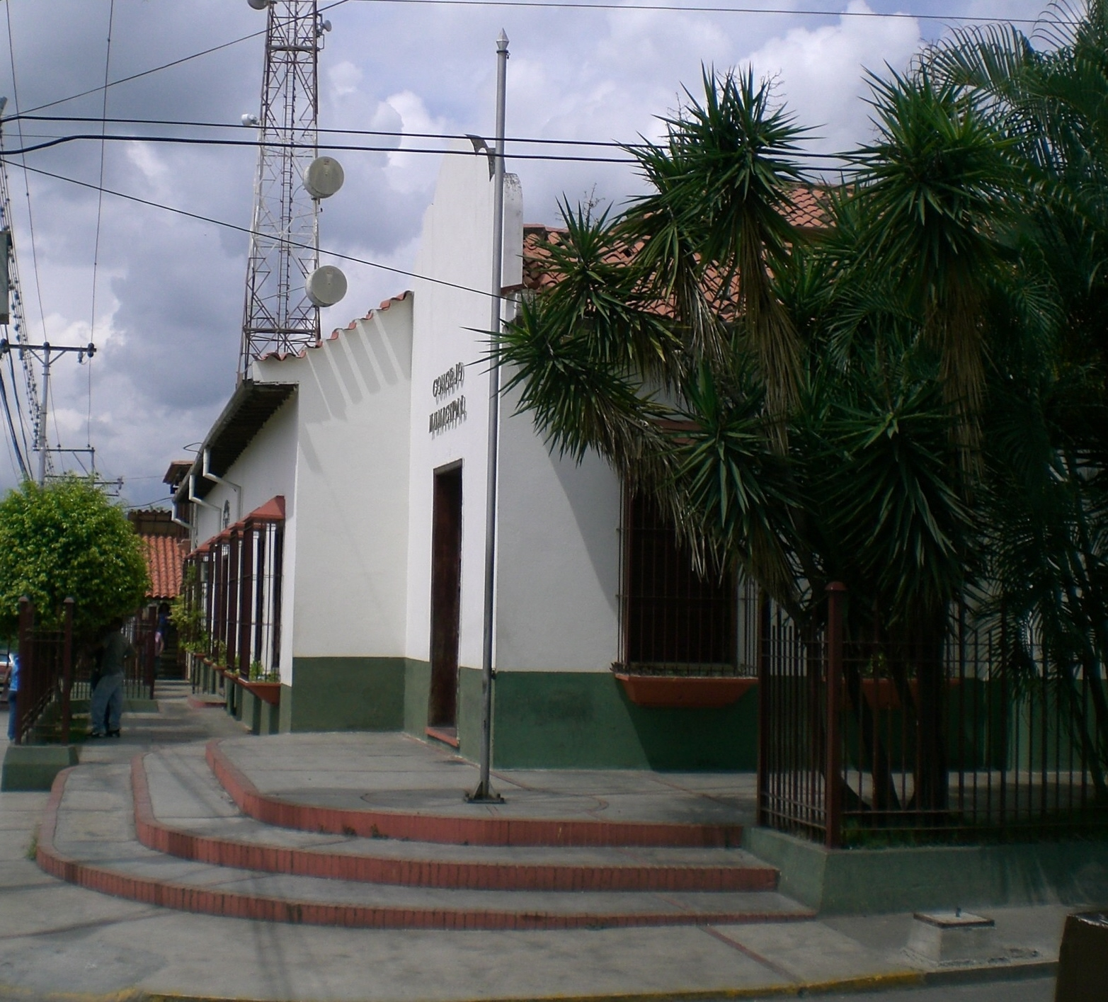 Municipal Council, Cúa, Venezuela